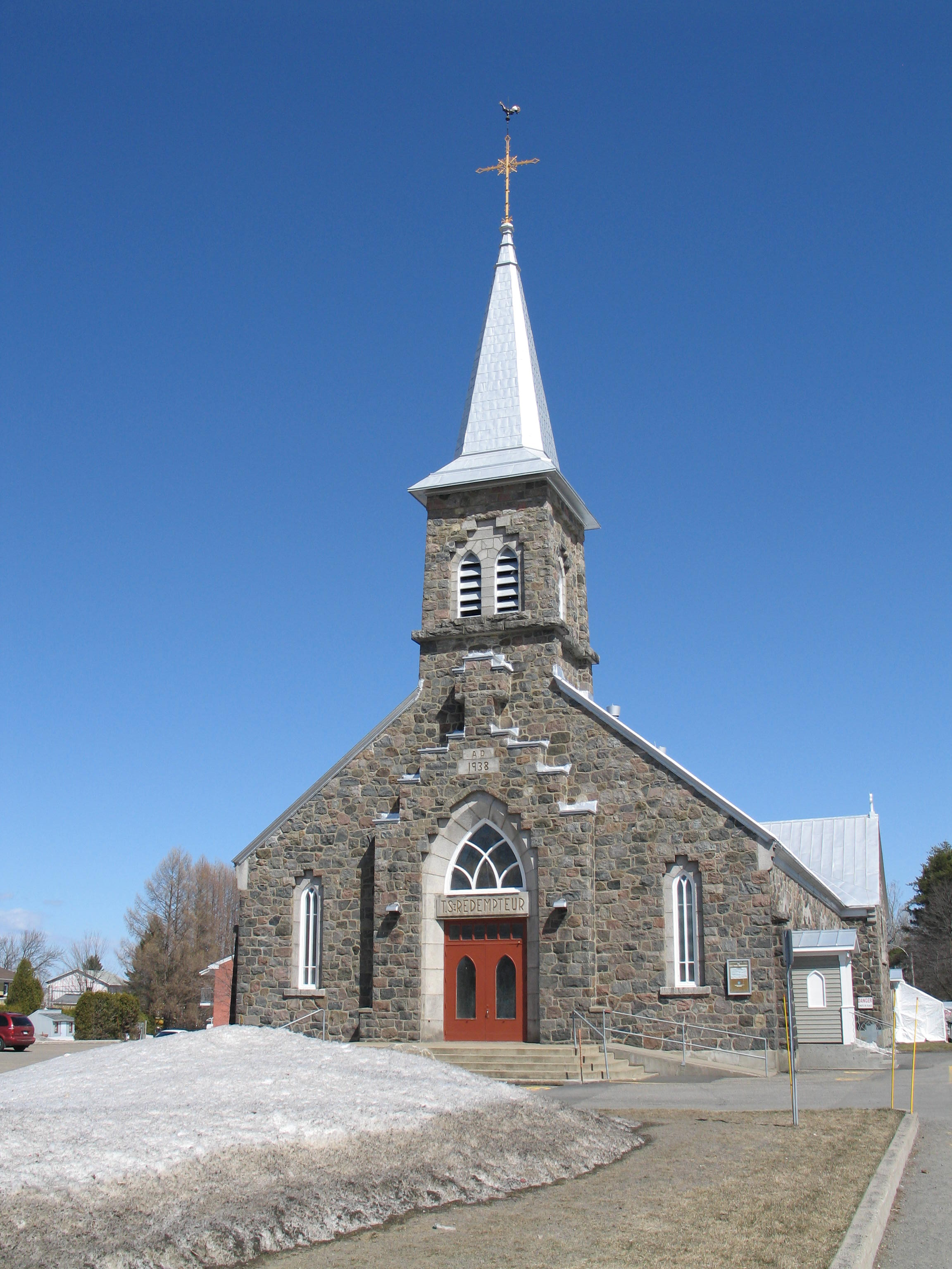 Église du Très-Saint-Rédempteur à Saint-Rédempteur, quartier de Lévis (Québec).